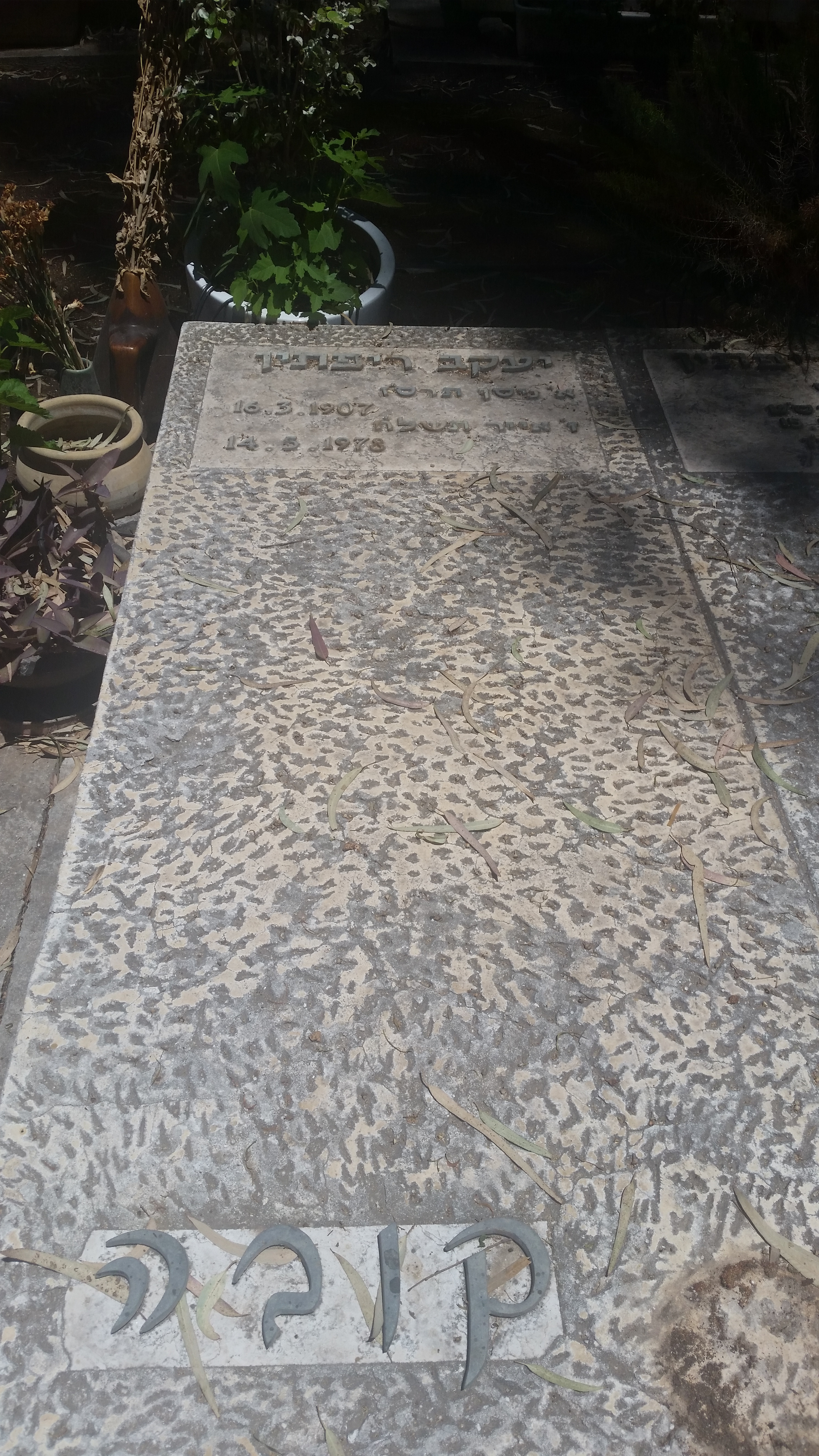 קבר יעקב ריפתין בבית הקברות בקיבוץ עין שמר